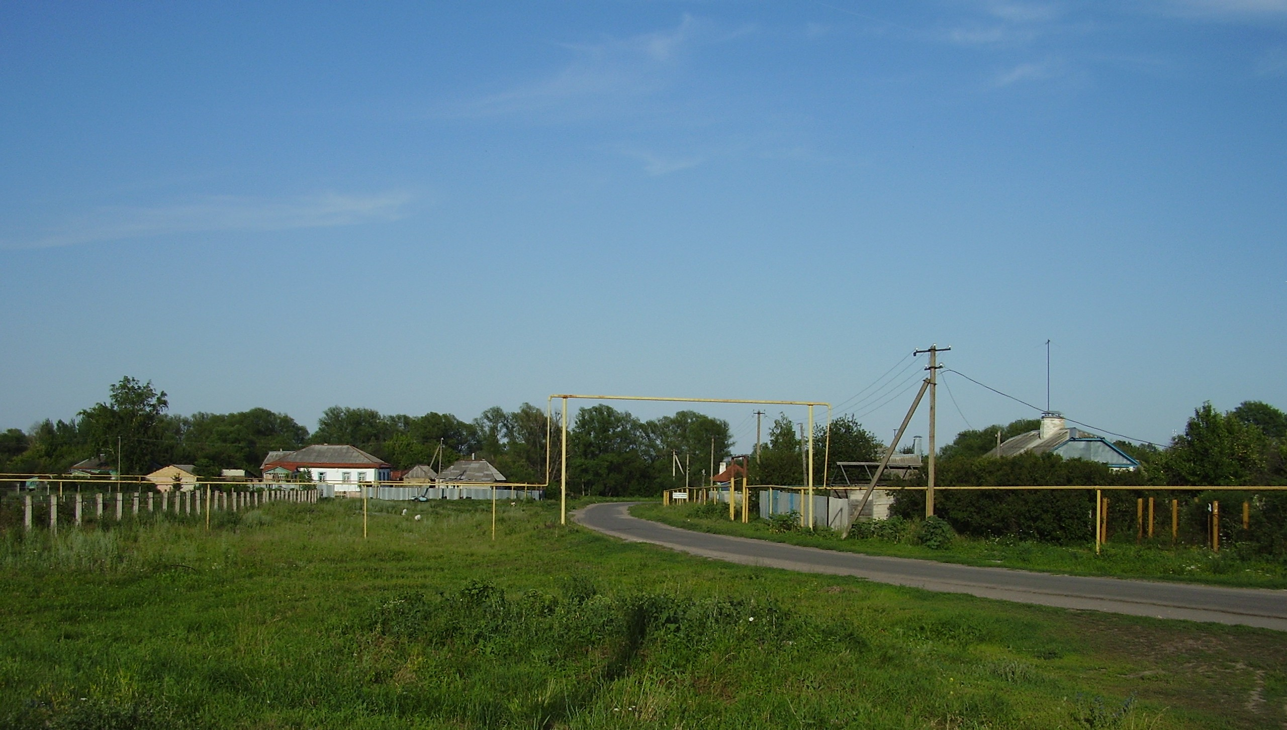 Воронежская область, Семилукский район, с.Латное